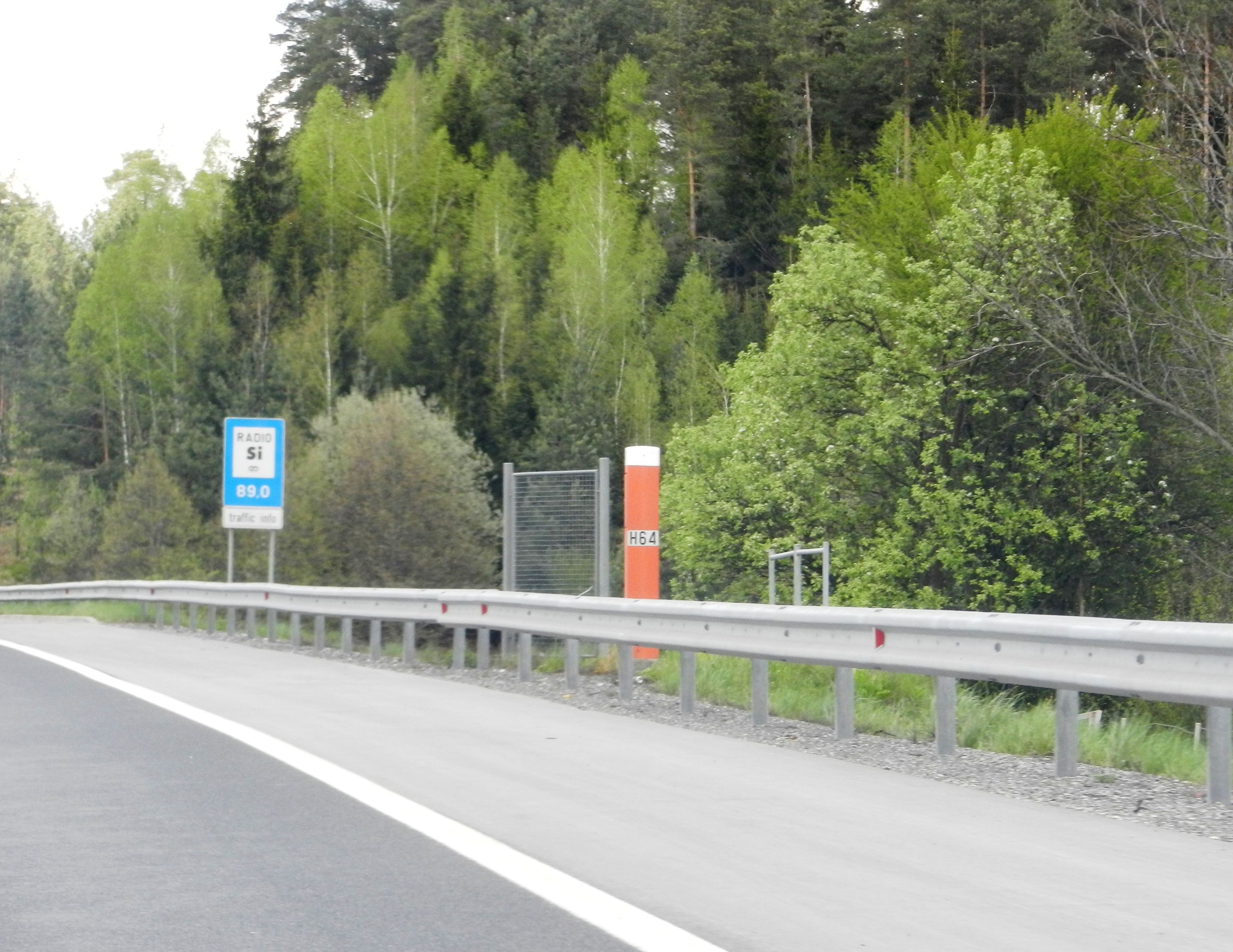 Klic v sili ob avtocesti